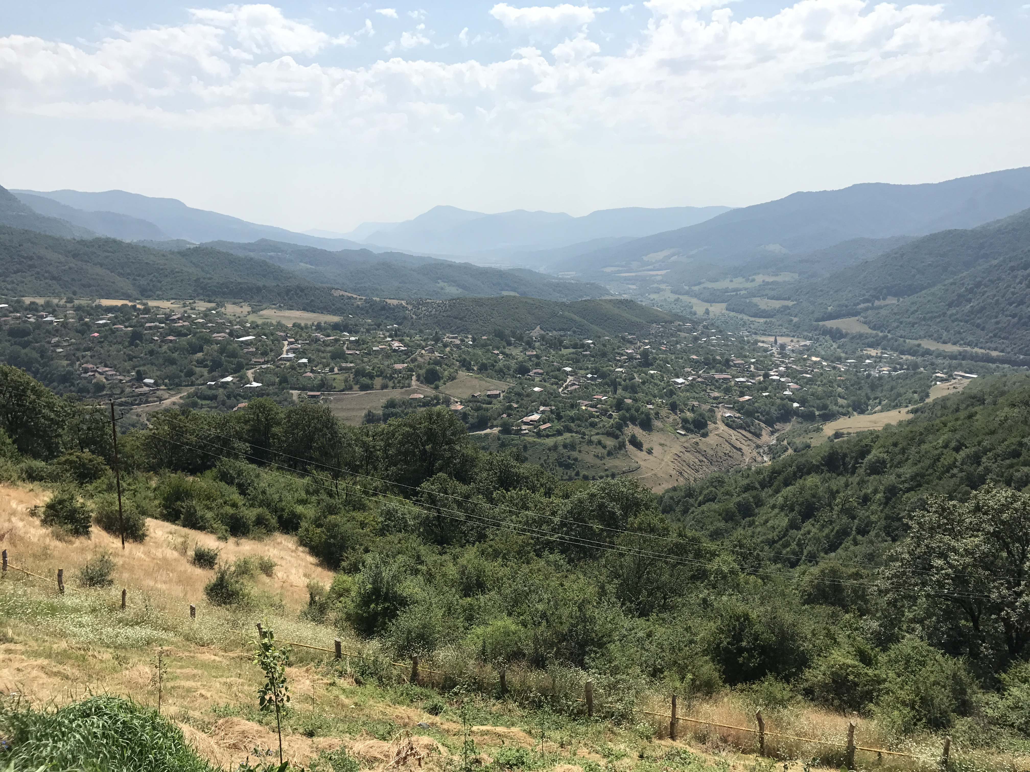 Monastère de Gandzasar en juillet 2017.